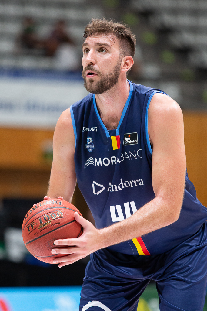 Dejan Musli en un partido de la Liga Catalana 2019 en el Olímpico de Badalona.